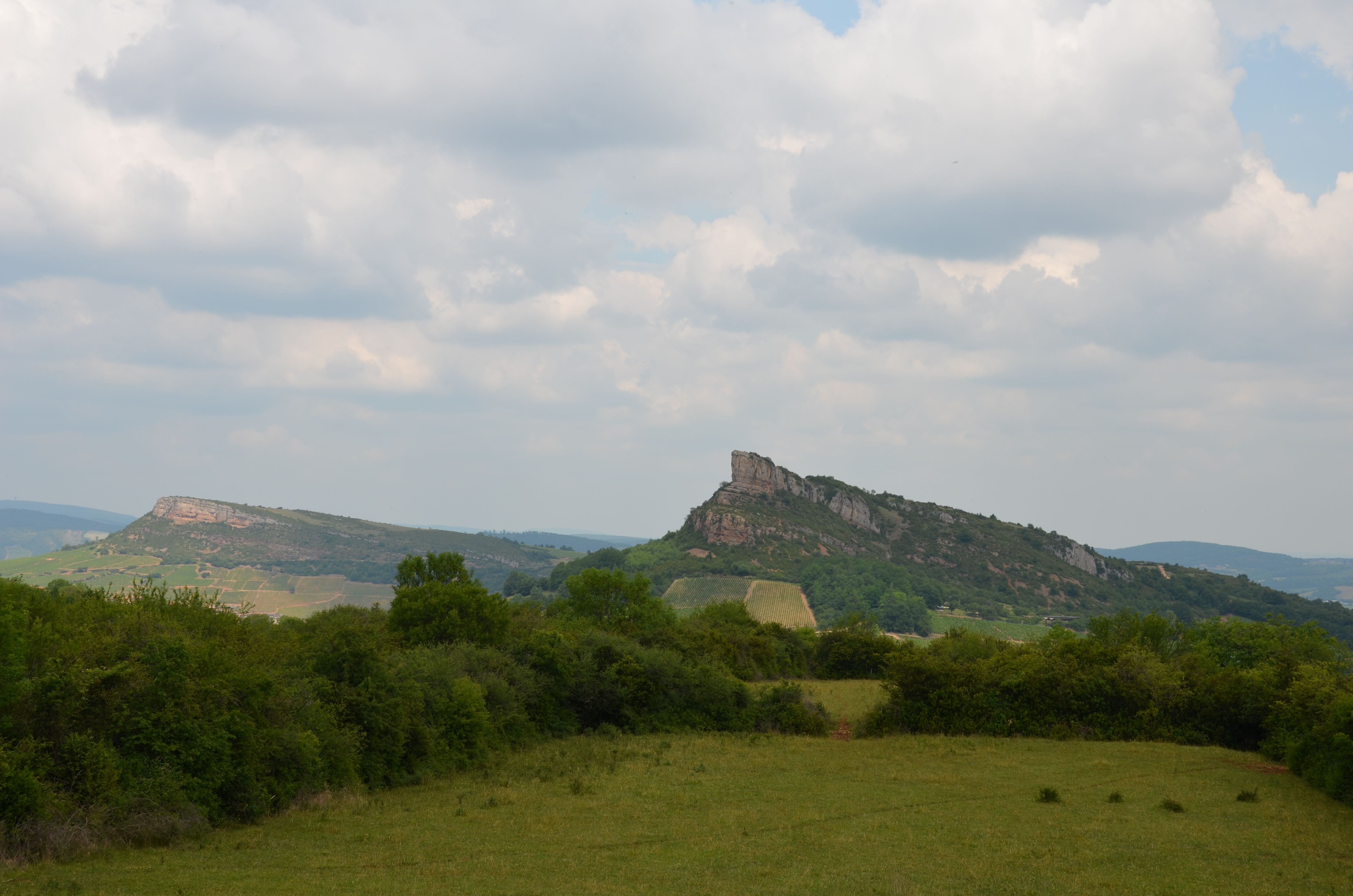 Vue de la roche de Solutré (à droite) et de la roche de Vergisson (à gauche) depuis la D 31